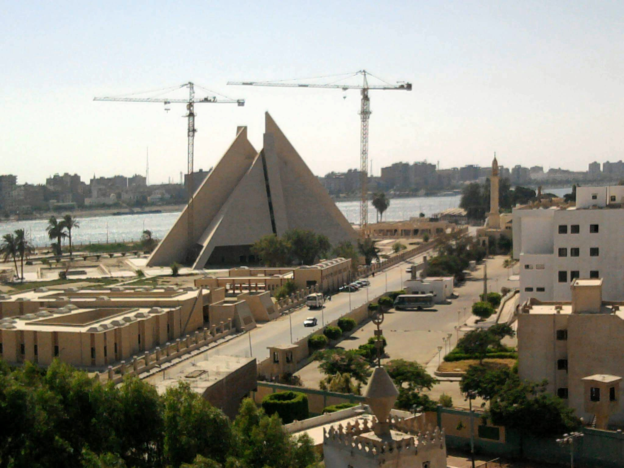 صورة لمتحف اخناتون الاثرى بمحافظة المنيا بصعيد مصر. و هو تحت الانشاء حيث بدأ العمل بالمشروع عام 2002 إلا انه لم يفتتح بعد.